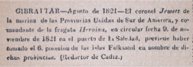 Declaraciones de David Jewett publicadas por el Redactor de Cádiz (España) en agosto de 1821